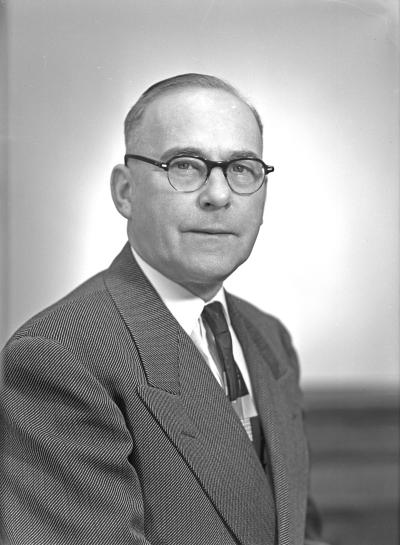 Senator Homer O. Nunamaker, 1955